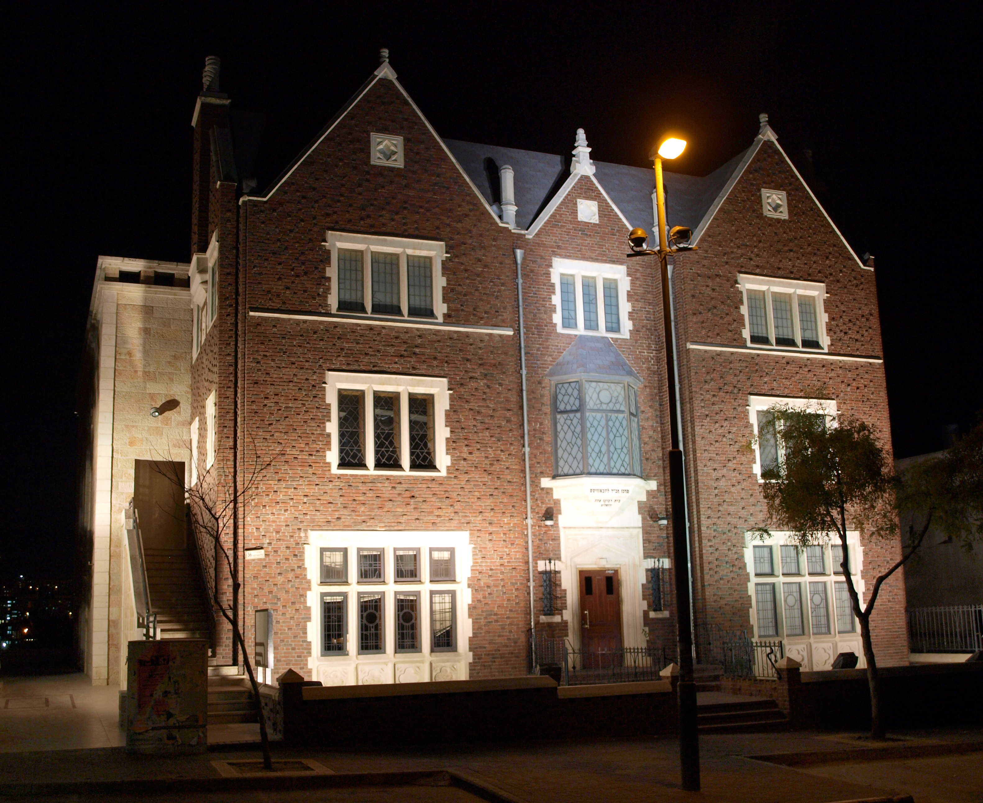 Chabat center in Ramat Shlomo, Jerusalem